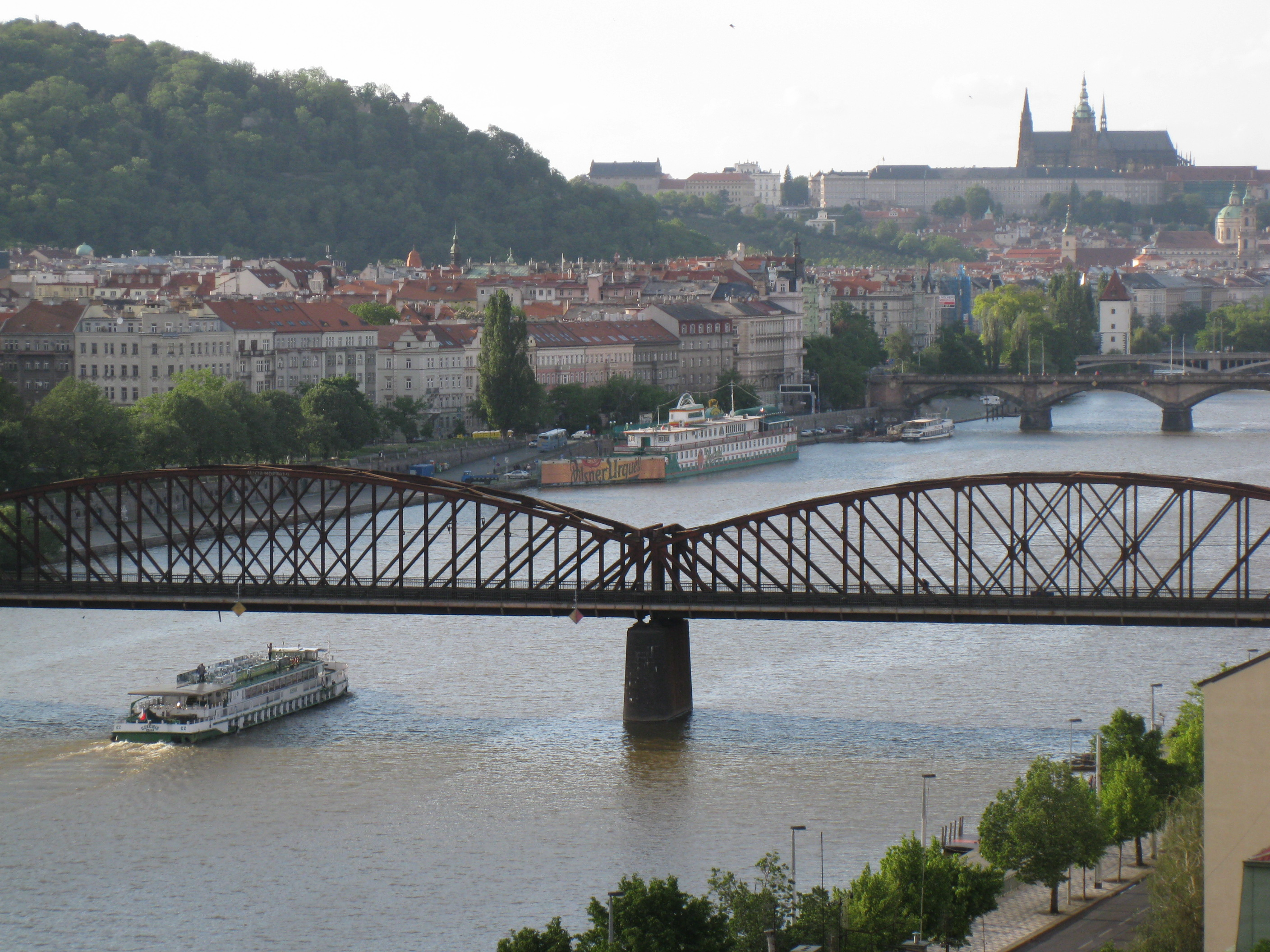 Soubor železničních mostů na trati Praha hlavní nádraží - Praha-Smíchov, Smíchov: parcely č. 5077/1 (smíchovská část mostu přes Vltavu), 561 (úzký pobřežní pás na smíchovské straně Vltavy), 5030/1 (úsek trati od mostu přes Vltavu k Nádražní ulici; zahrnuje most přes Hořejší nábřeží a most přes ulici Svornosti), Vyšehrad: parcely č. 281 (vyšehradská část mostu přes Vltavu), 279/2 (pilíř mostu na Rašínově nábřeží), 267/2 a 267/3 (úsek mezi Rašínovým nábřežím a mostem v prodloužení osy Podskalské ulice), 284/1 (od mostu přes Vyšehradskou ulici k podchodu v prodloužení Přemyslovy ulice).